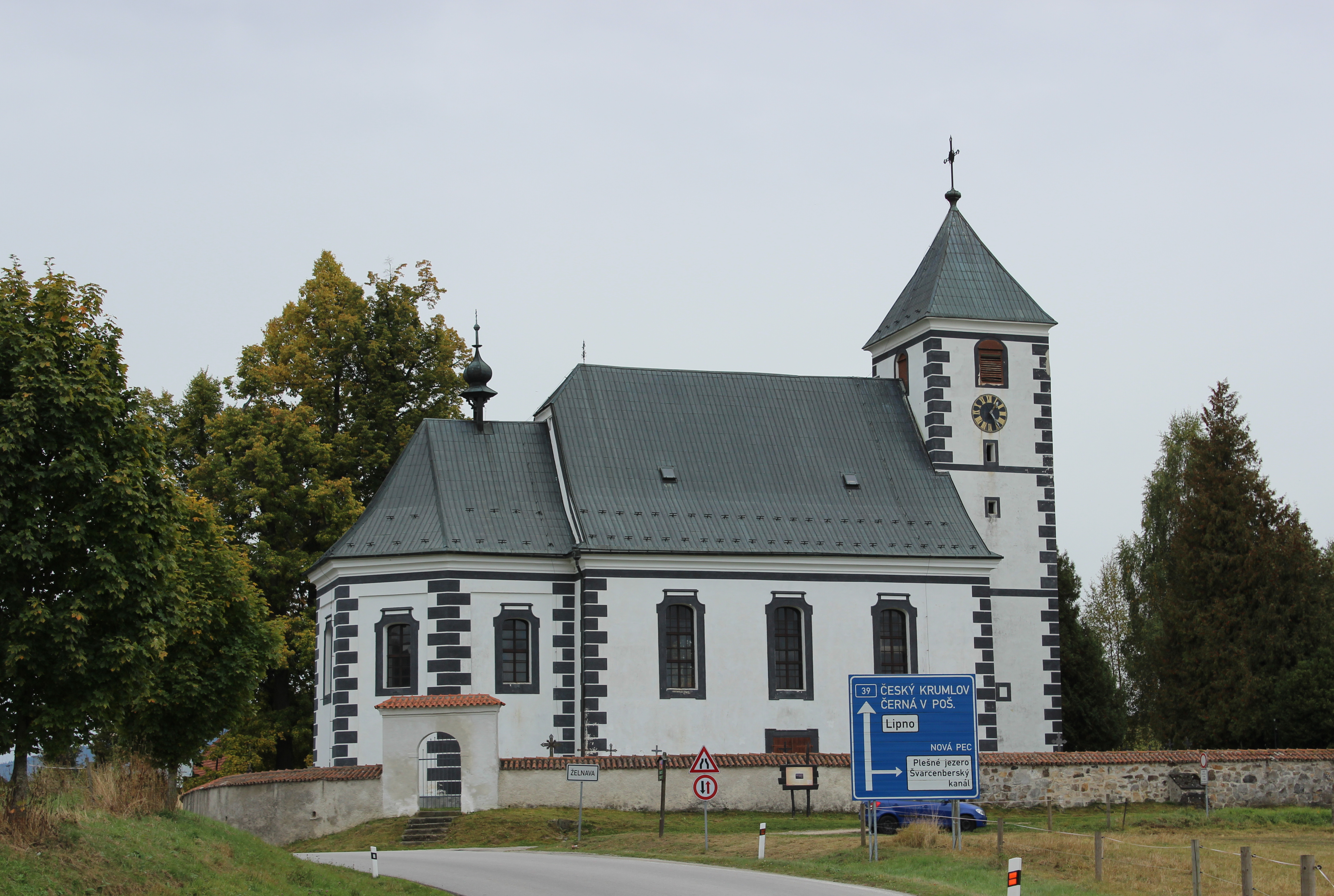 Kostel sv. Jakuba. Želnava v okrese Prachatice, kraj Jihočeský. Česká republika.